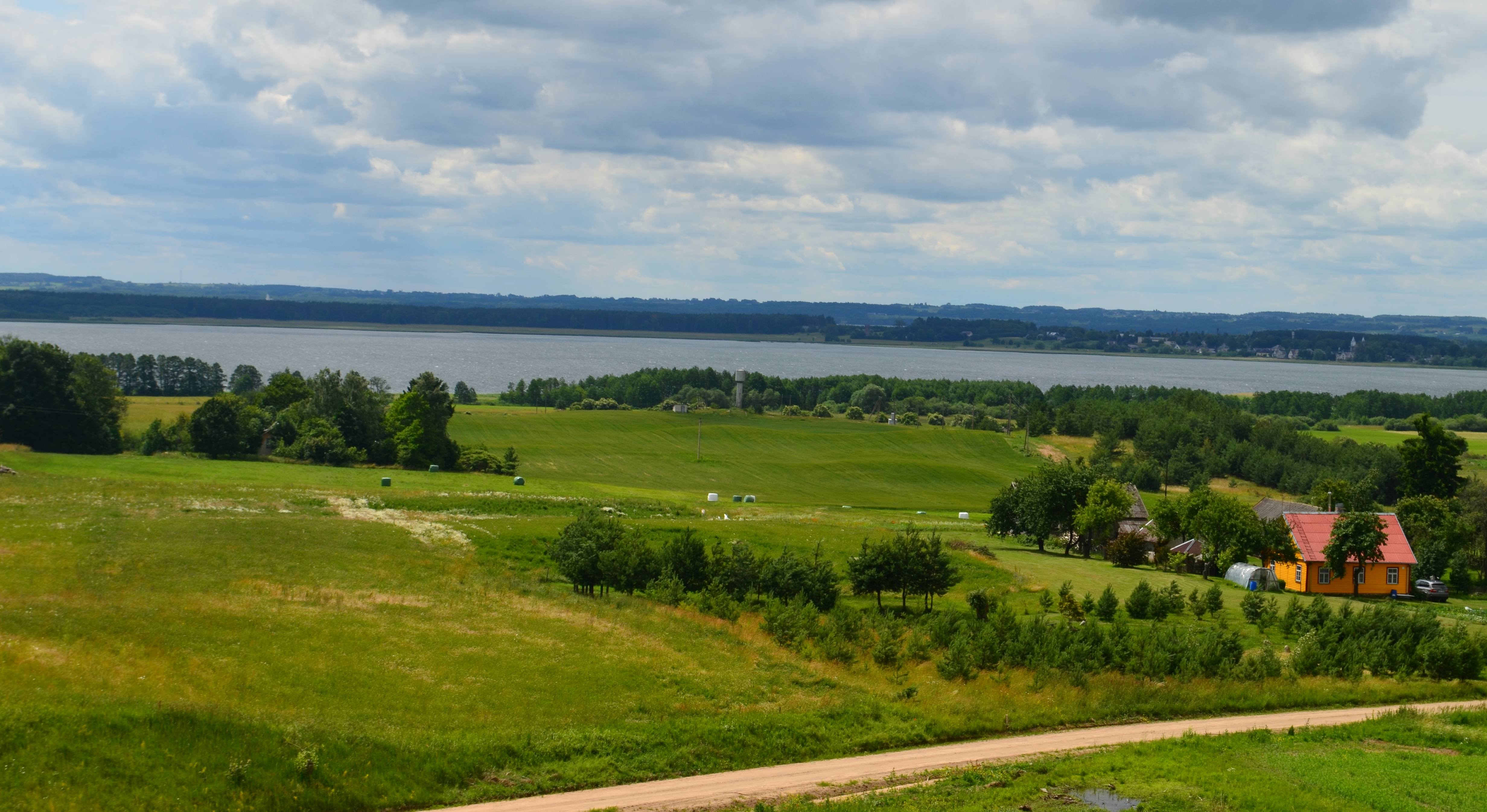 Papėčiai Metelio pakrantėje, Alytaus raj.